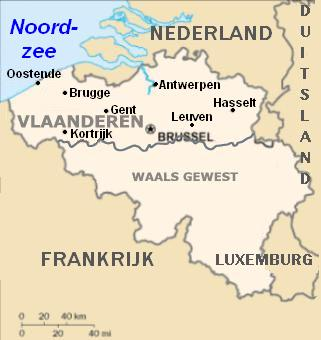 Kaart Vlaanderen. Eigen bewerking van de kaart: Afbeelding:Belgie.png Willem 11 jul 2004 21:04 (CEST)